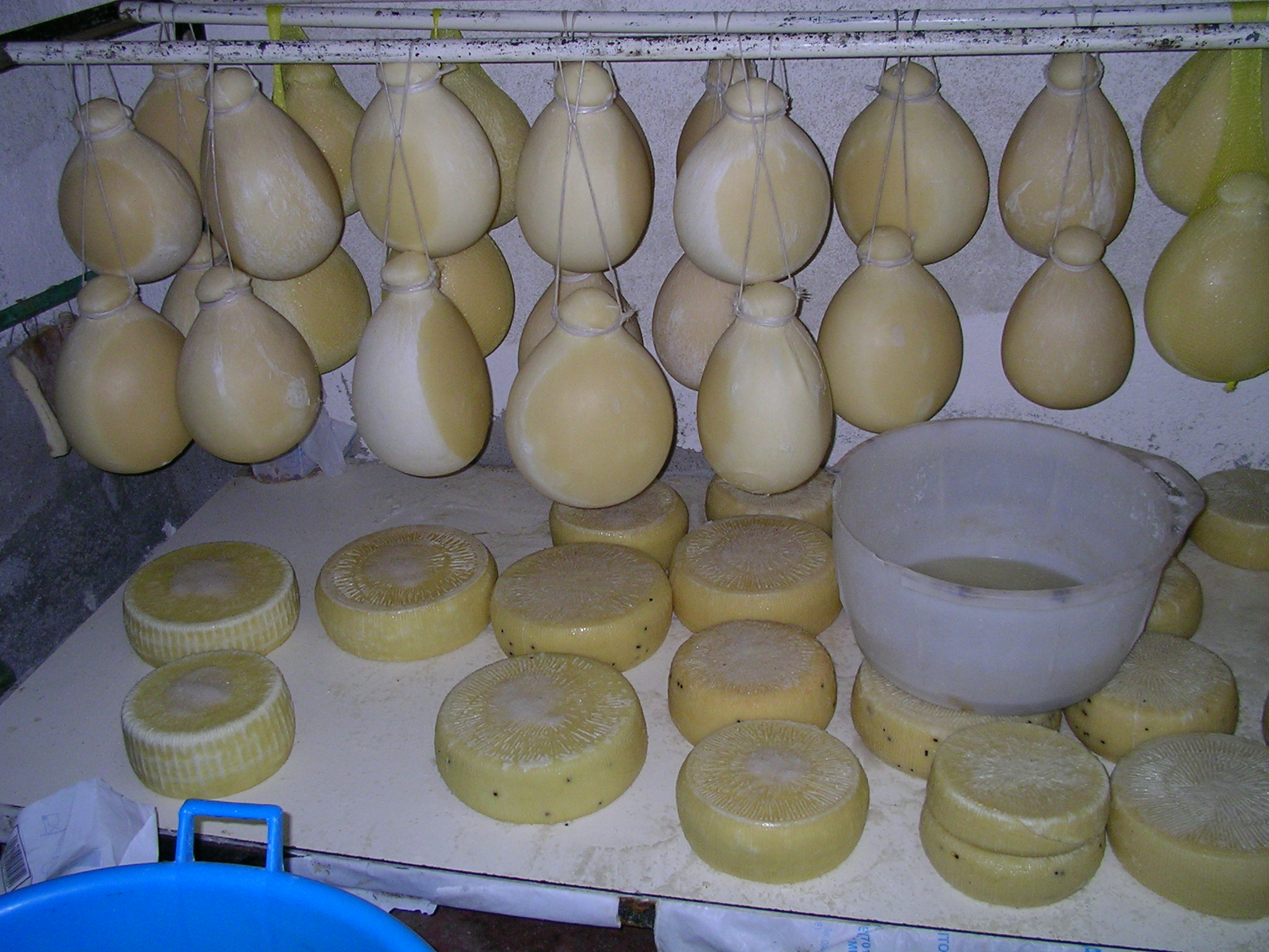 Formaggi tipici prodotti nella zona dei Monti Nebrodi (Messina). Appese le forme di Provola e in basso, di forma cilindrica, le forme di Canestrato al pepe